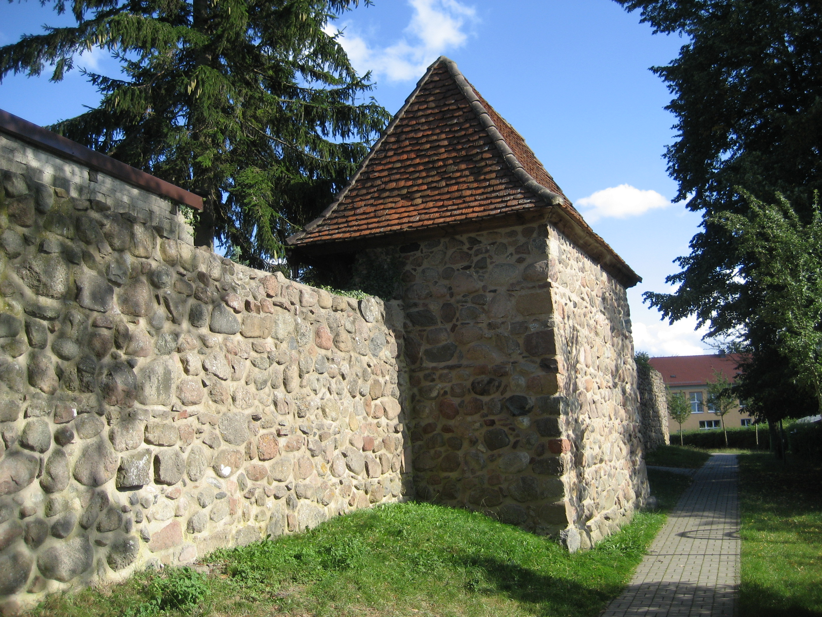 Wiekhaus in der Stadtmauer von Brüssow.